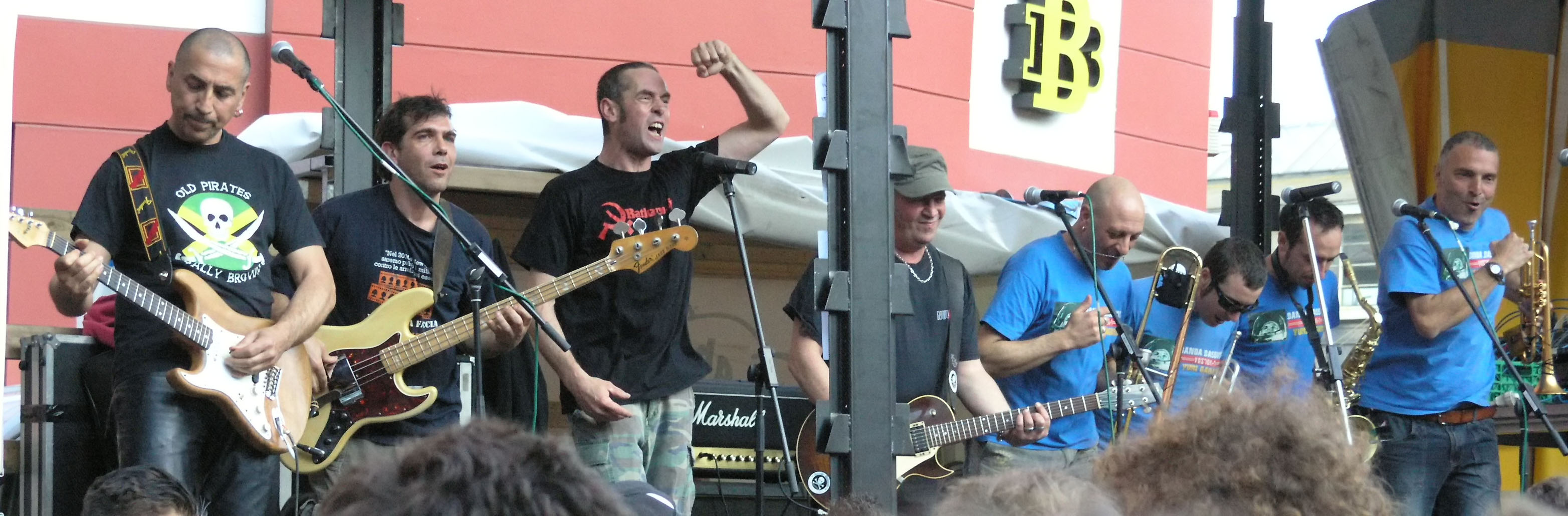 Die italienische Ska-Punk-Band Banda Bassotti am 1. Mai 2008 auf der Myfest-Bühne Beats against fascism am Kottbusser Tor, ca. 18:30.